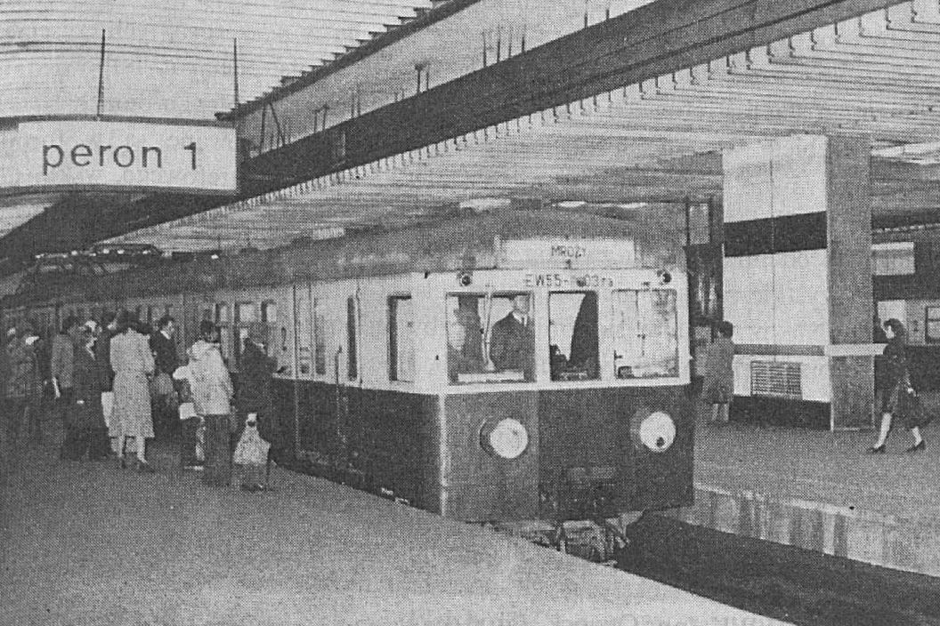 Elektryczny zespół trakcyjny EW55-03 jako pociąg osobowy do stacji Mrozy stoi na przystanku Warszawa Śródmieście.